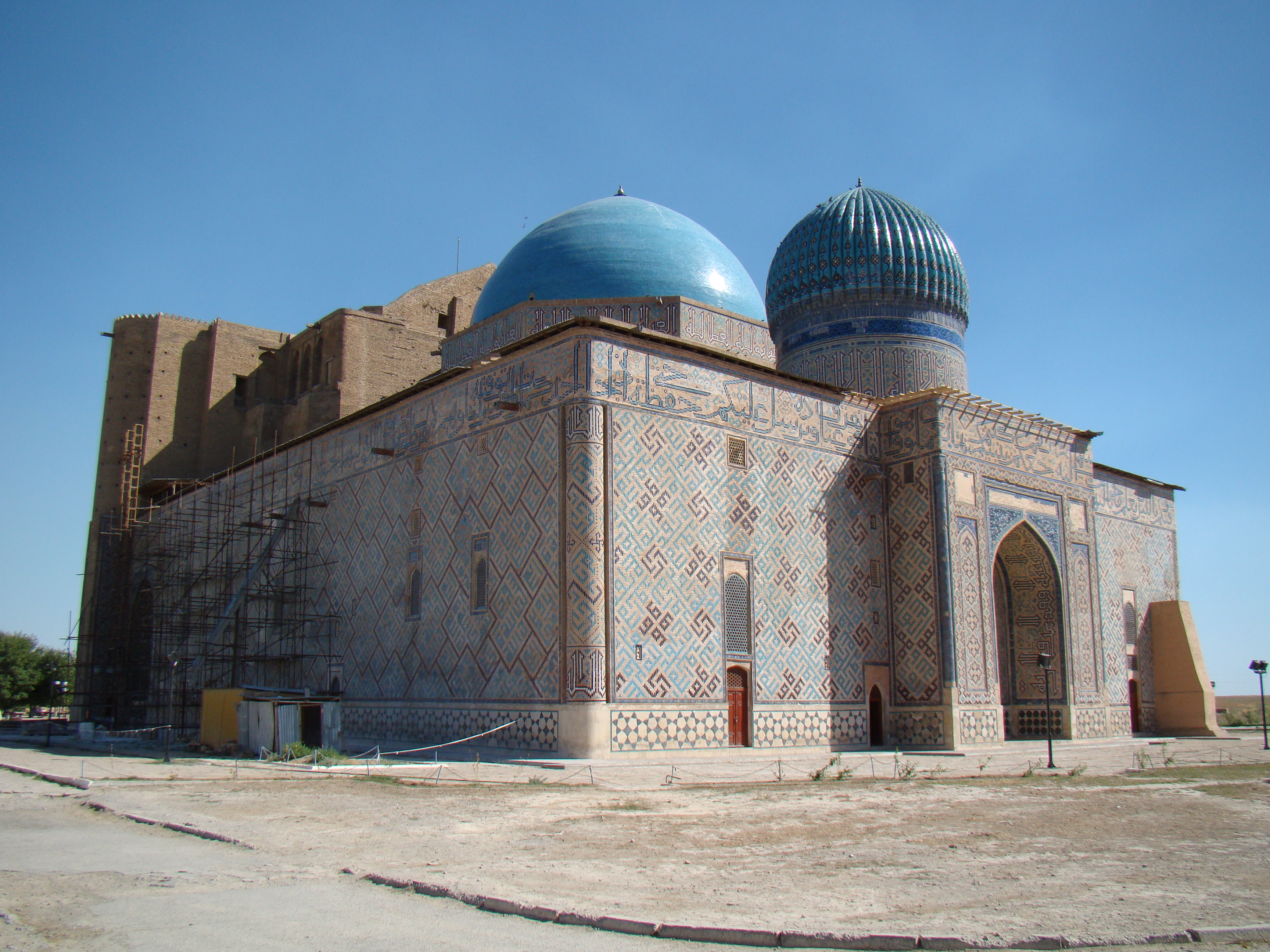 Ханака Ахмеда Ясави.